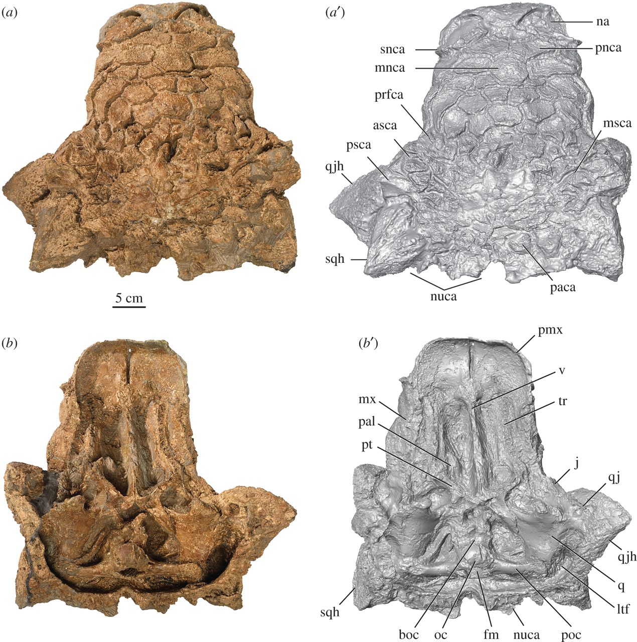 Holotype of Zuul crurivastator, ROM 75860, skull in (a) dorsal and (b) ventral views. (a′,b′) are digital models of the skull. Abbreviations are as follows: asca, anterior supraorbital caputegulum; boc, basioccipital; fm, foramen magnum; j, jugal; ltf, laterotemporal fenestra; mnca, median nasal caputegulum; msca, middle supraorbital caputegulae; mx, maxilla; na, external naris; nuca, nuchal caputegulum; oc, occipital condyle; paca, parietal caputegulum; pal, palatine; pmx, premaxilla; pnca, postnarial caputegulum; poc, paroccipital process; prfca, prefrontal caputegulum; psca, posterior supraorbital caputegulum; pt, pterygoid; q, quadrate; qj, quadratojugal; qjh, quadratojugal horn; snca, supranarial caputegulum; sqh, squamosal horn; tr, tooth row; v, vomer.